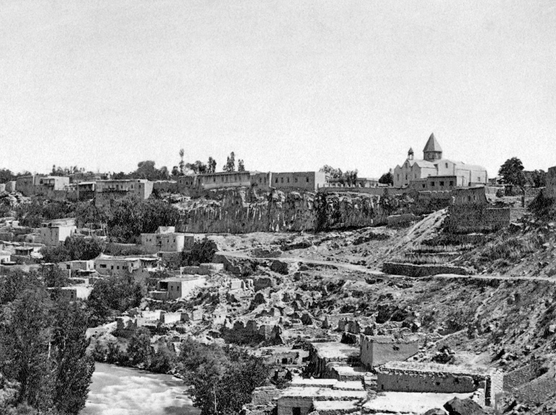 Ձորագյուղ, Երևան